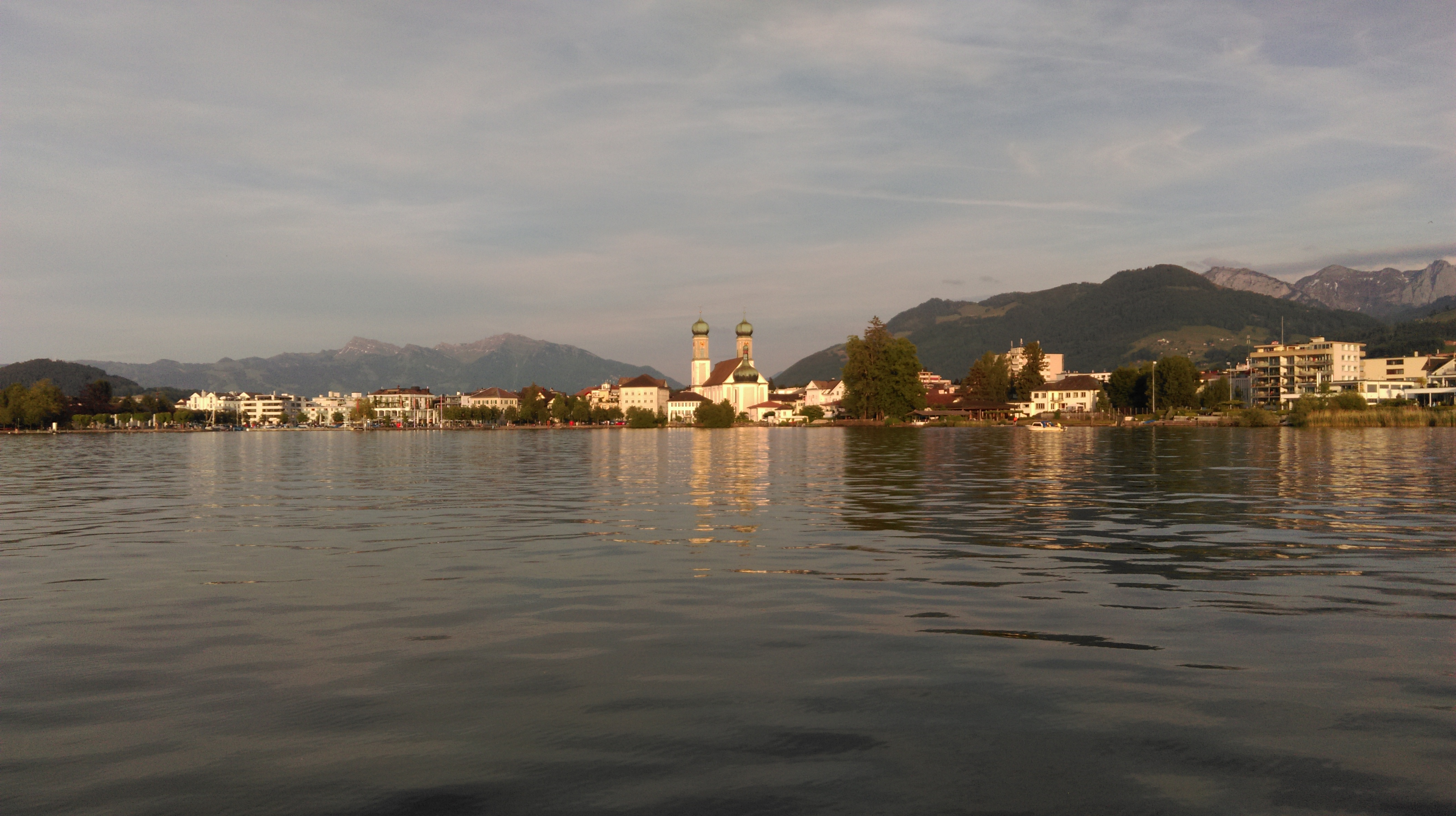 Town of Lachen SZ seen from lake Zurich